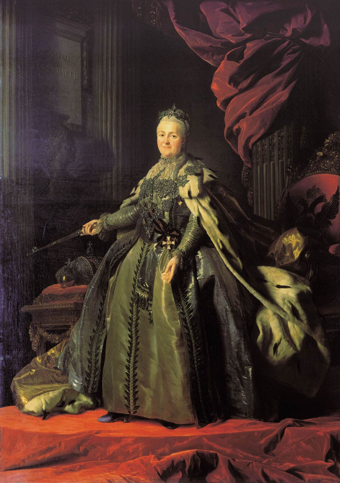 Katarina II, 1729-1796, kejsarinna av Ryssland prinsessa av Anhalt-Zerbst